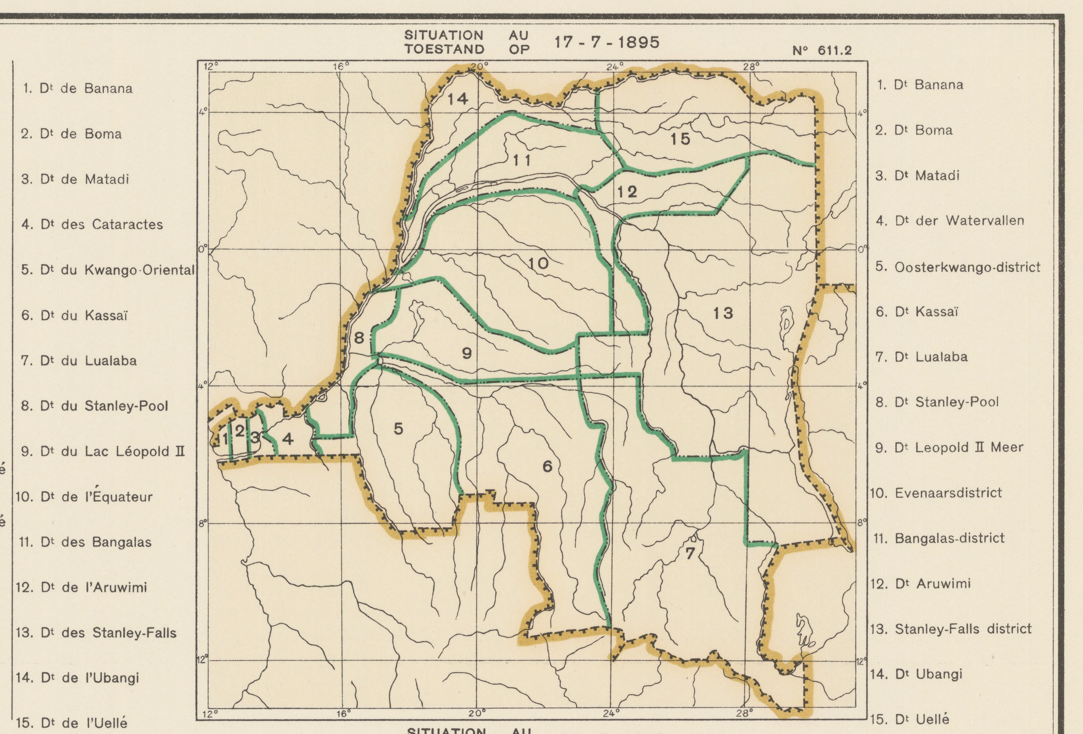 Carte des subdivisions administrative